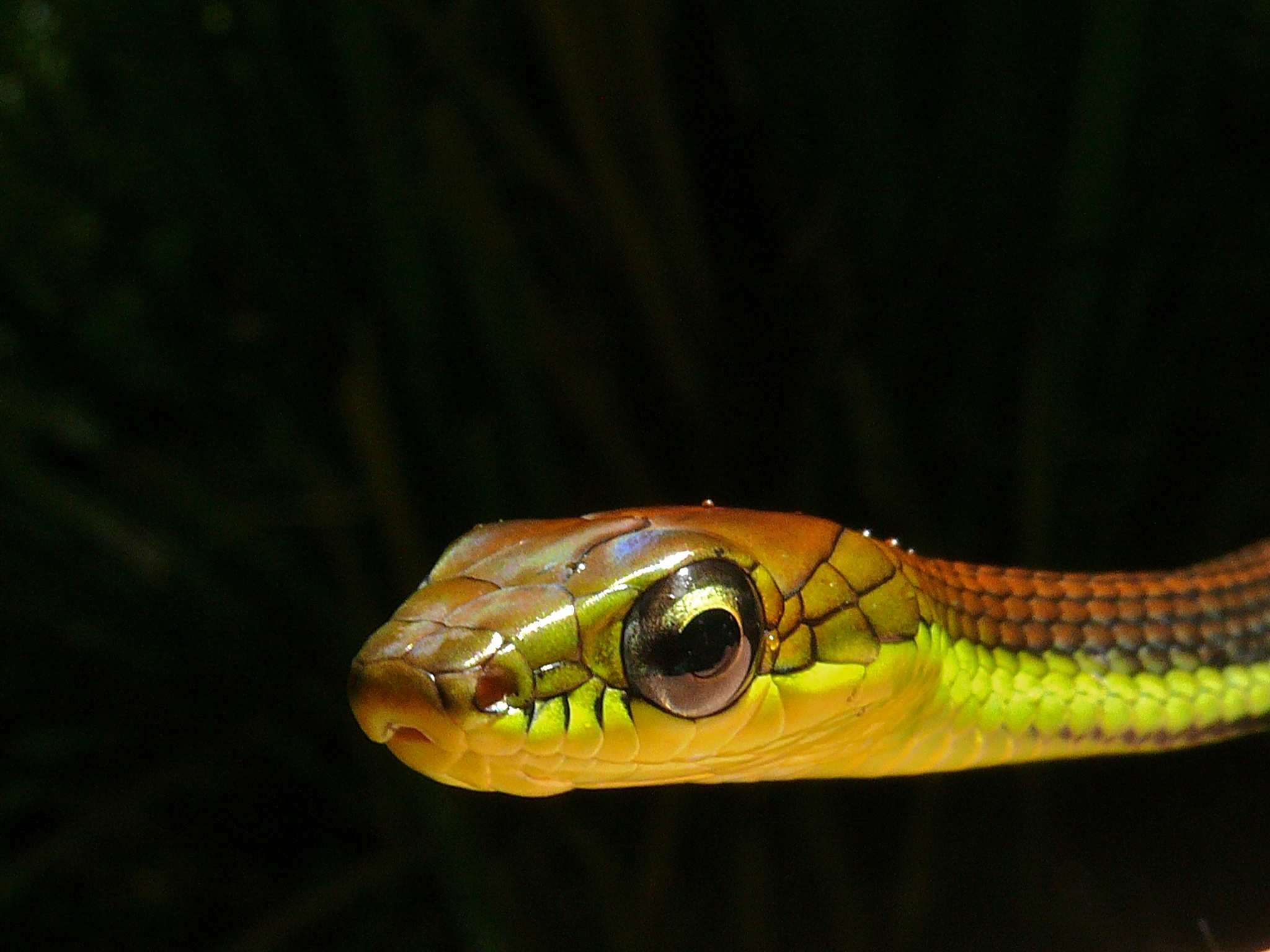 Gunung Mulu NP, Sarawak, MALAYSIA